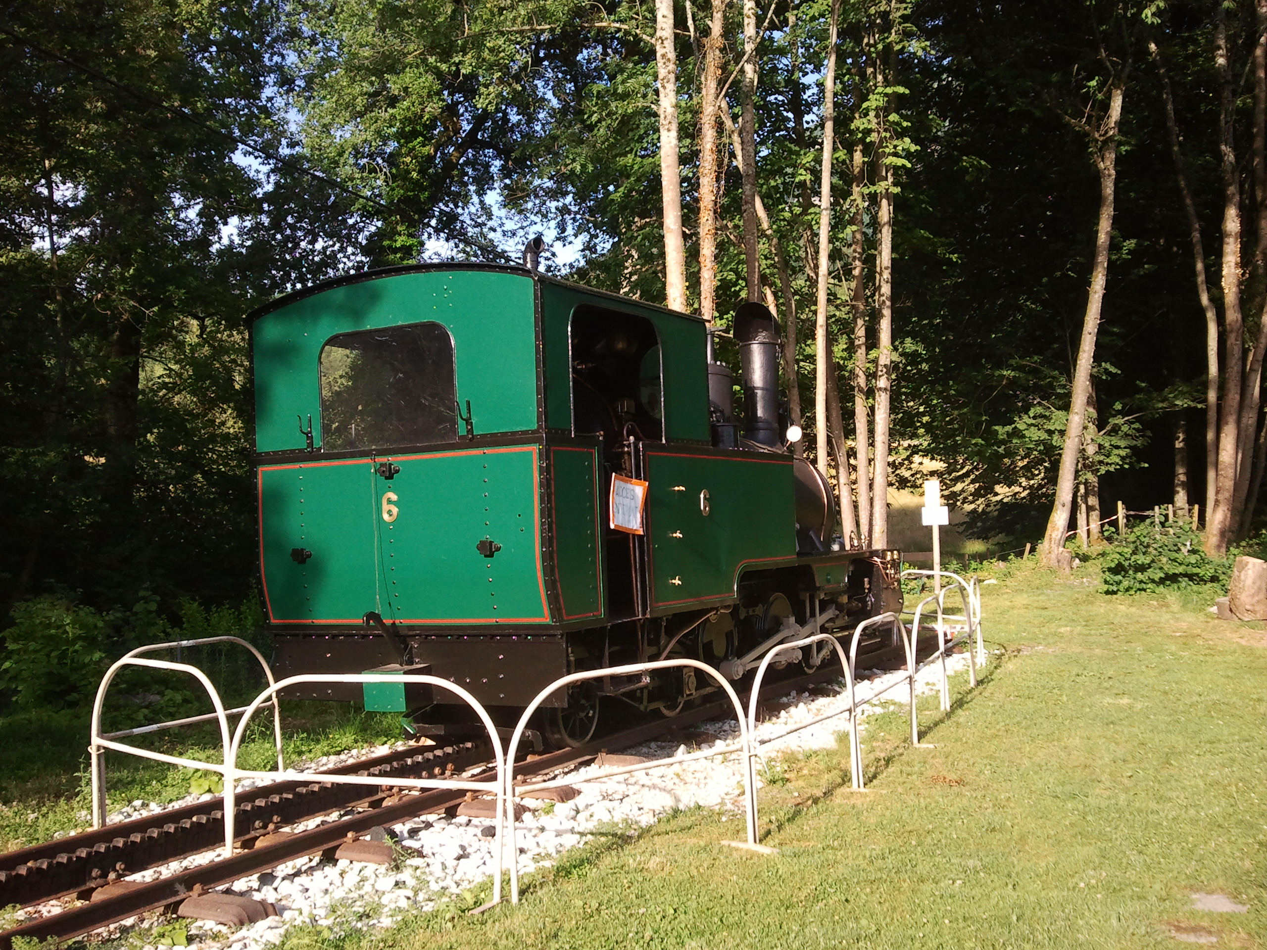 Visible sur Mouxy (73)